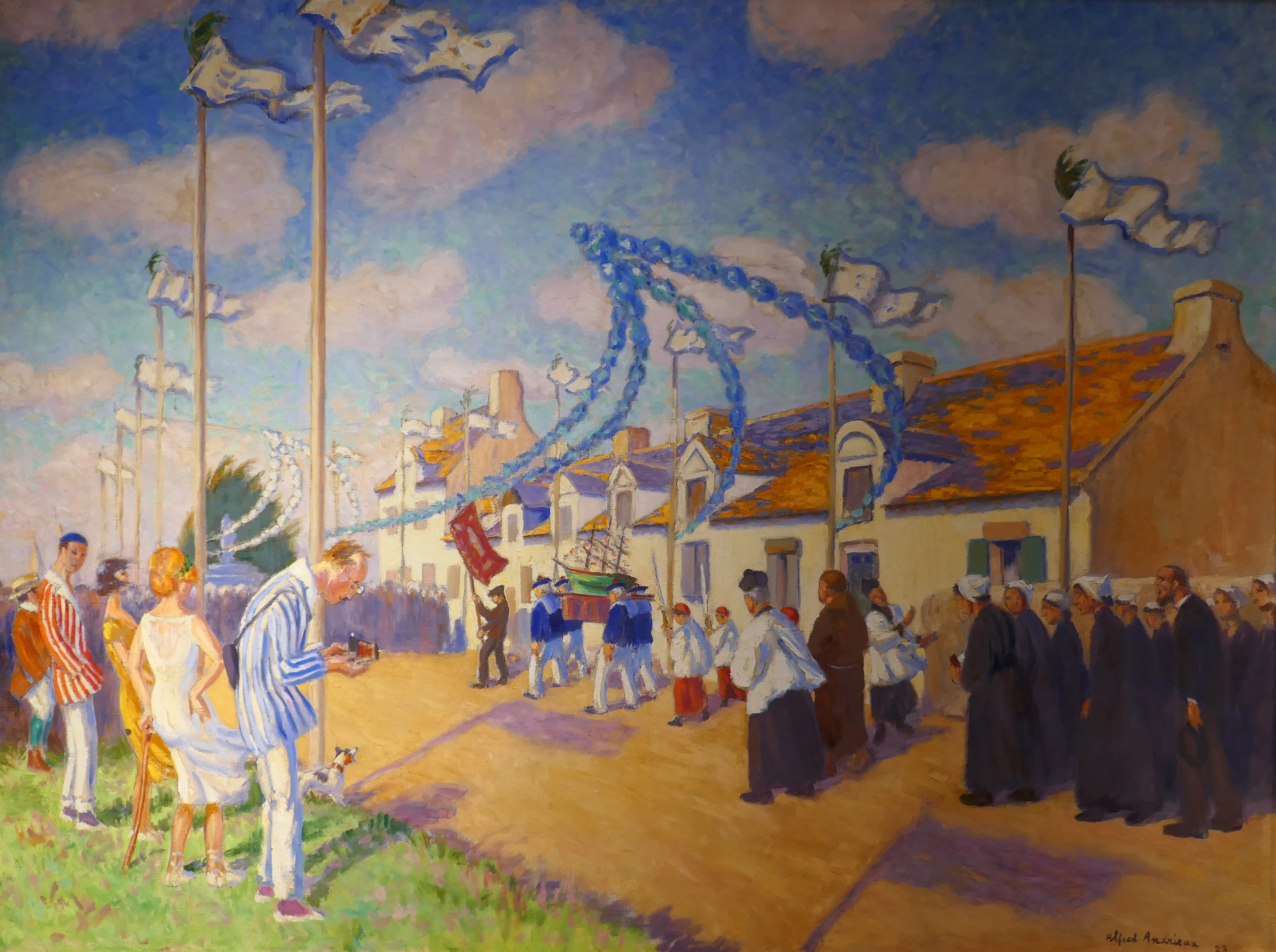 Alfred Andrieux (1879-1945, selon Musée) [ou 1878-1944, selon d'autres sources], La Procession du 15 août à Mesquer, 1923 ? Musée des Marais salants à Batz-sur-Mer (44).